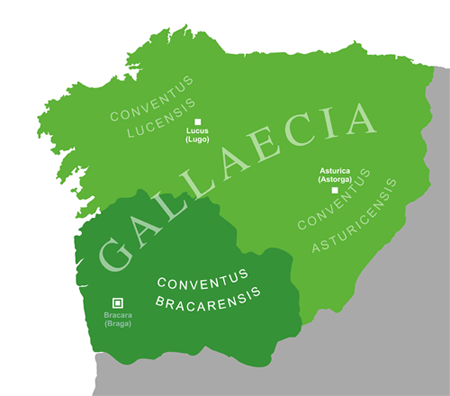 Mapa xeográfico-administrativo da Gallaecia no século III d.C, onde se destaca o Conventus bracarensis.